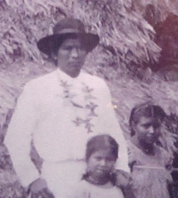 Antonio Saldaña, último rey de Talamanca (Costa Rica).